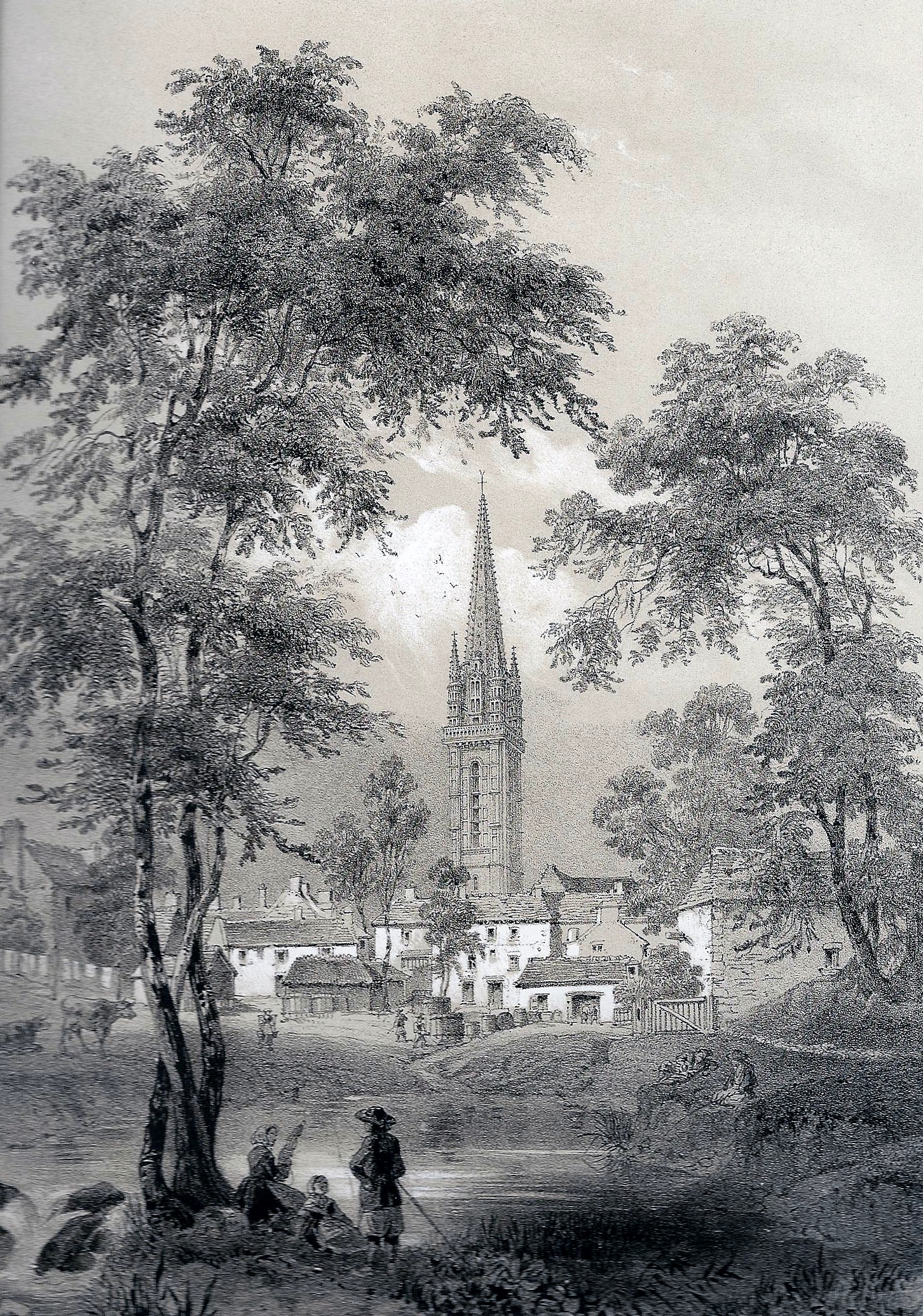 Landivisiau en 1867 (dessin de Félix Benoist publié en 1867 dans "La Bretagne contemporaine", tome "Finistère")